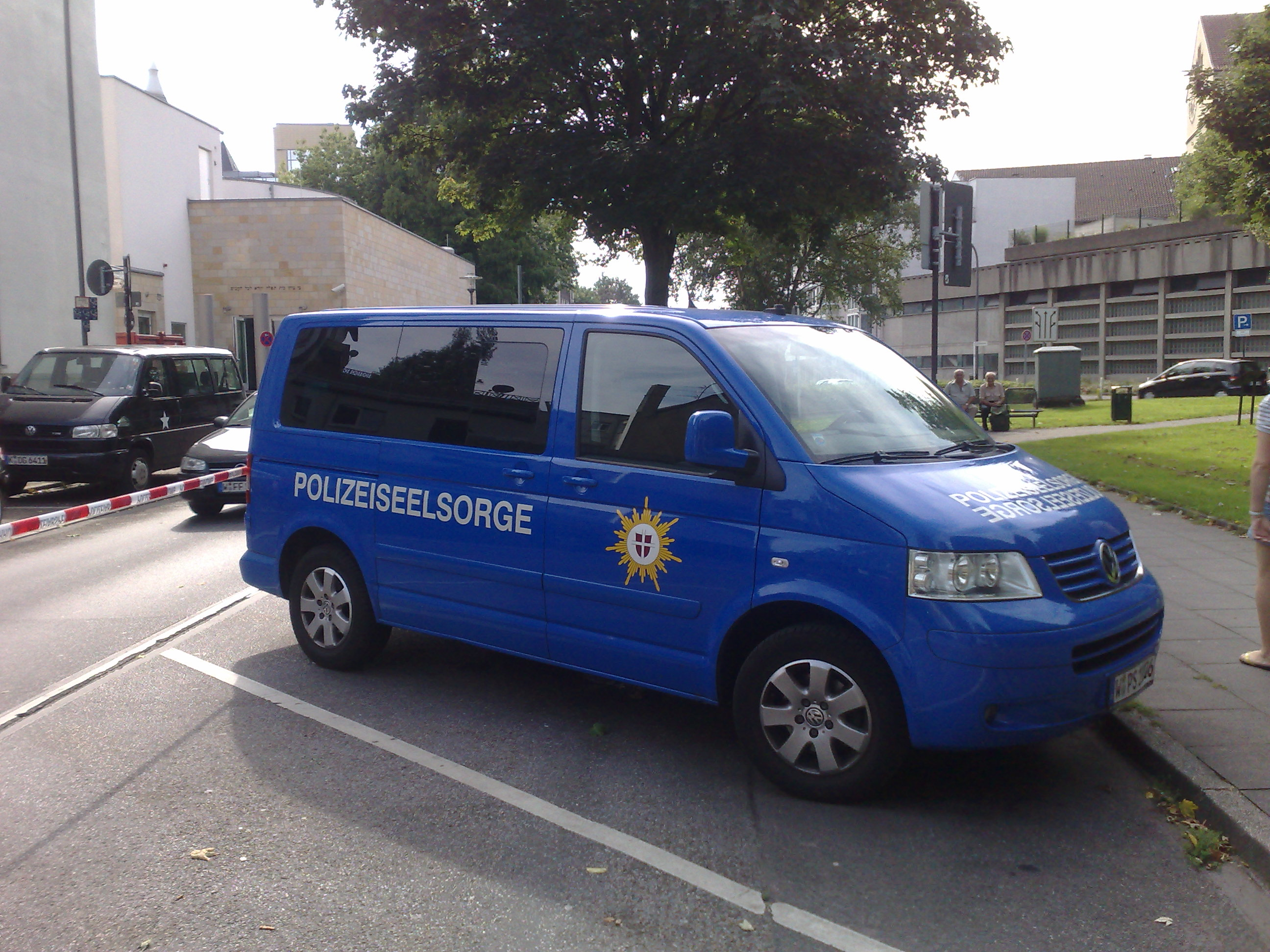 Paul-Humburg-Straße, Wuppertal